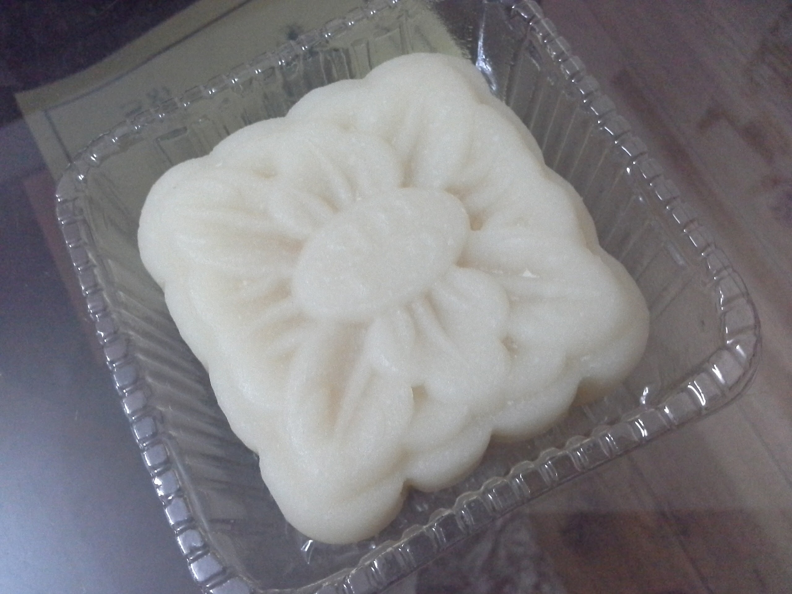 Một chiếc bánh dẻo trung thu đựng trong khay nhựa.